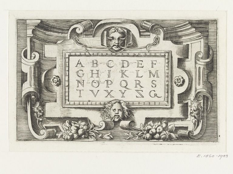 Gravure au burin de Georges Reverdy